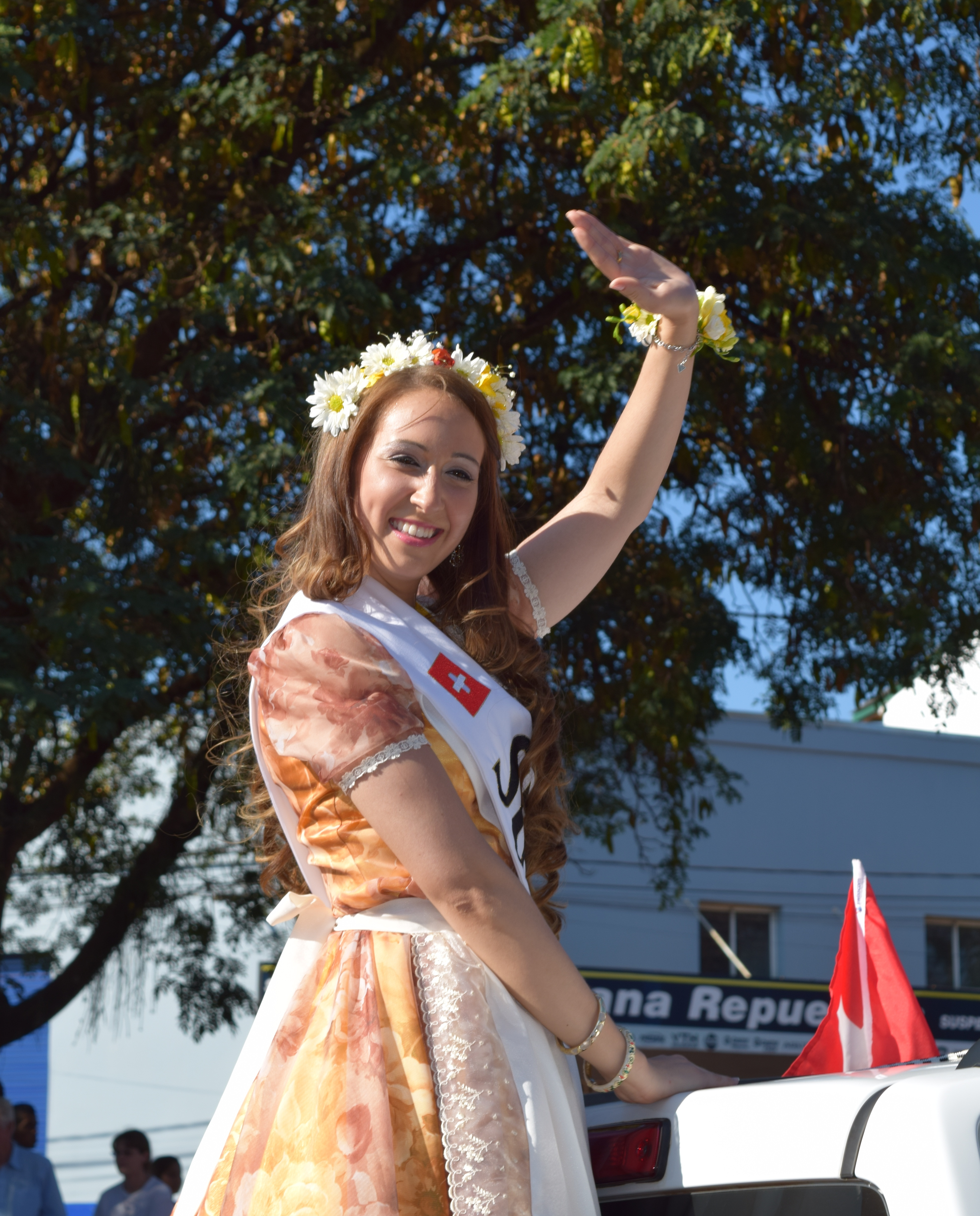 Desfile inaugural de la XXXV Fiesta Nacional del Inmigrante realizada en Septiembre de 2014 en Oberá, provincia de Misiones, Argentina.